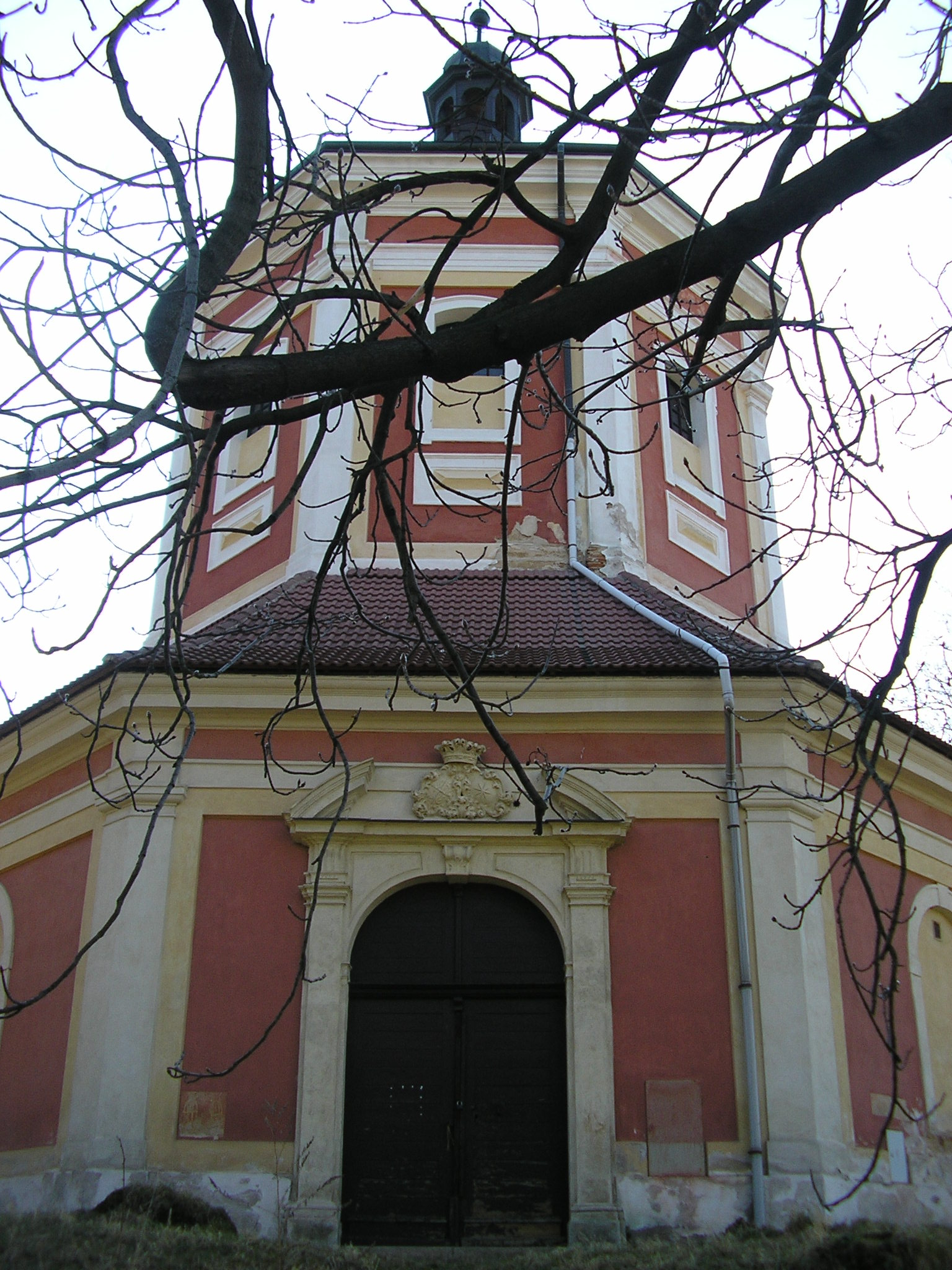 Kaple Nanebevzetí Panny Marie, jihovýchodně od vsi, Schořov.